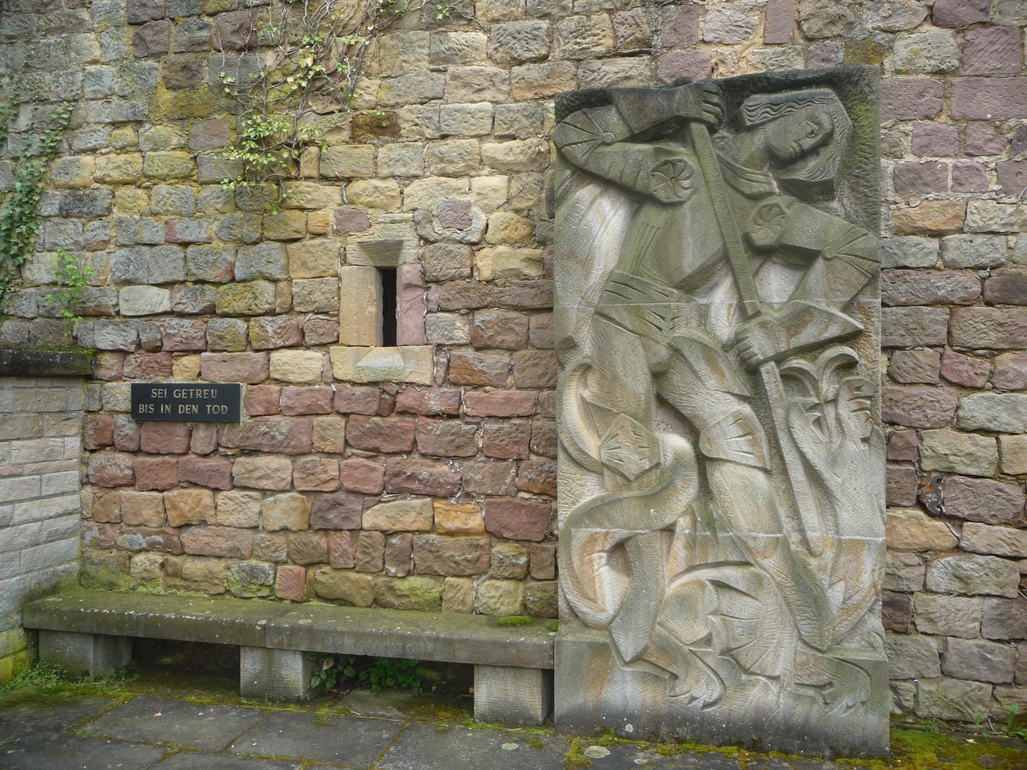 Neuleiningen ist eine Ortsgemeinde im pfälzischen Landkreis Bad Dürkheim (Rheinland-Pfalz).